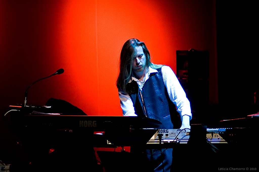 Yes concert at Gran Teatro del Banco Central del Paraguay, Asunción, Paraguay